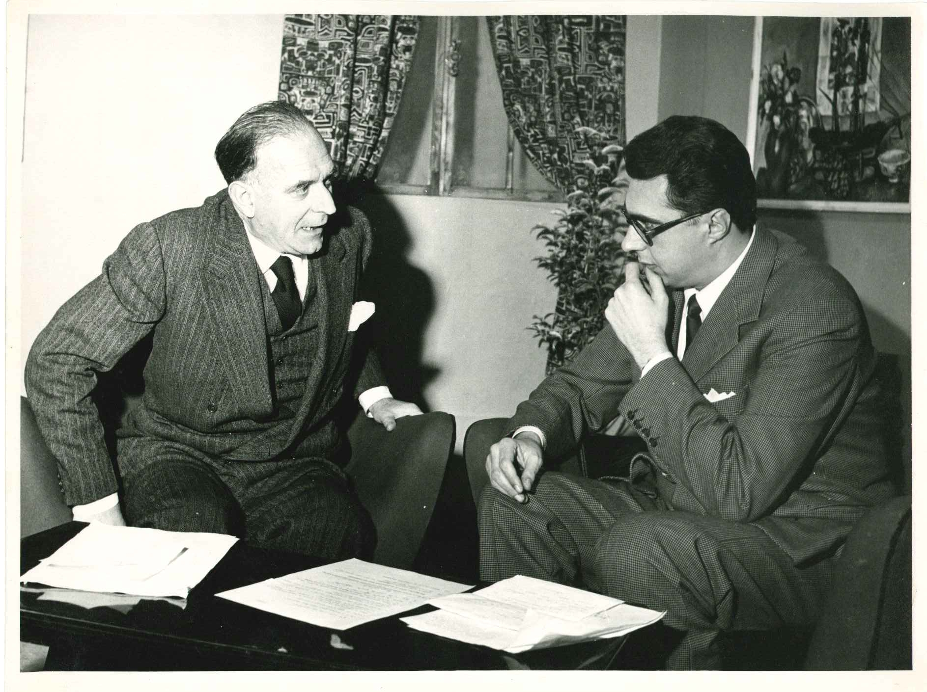 Il fisico Antonio Carrelli e lo scrittore Luigi Silori a Bologna (1960)